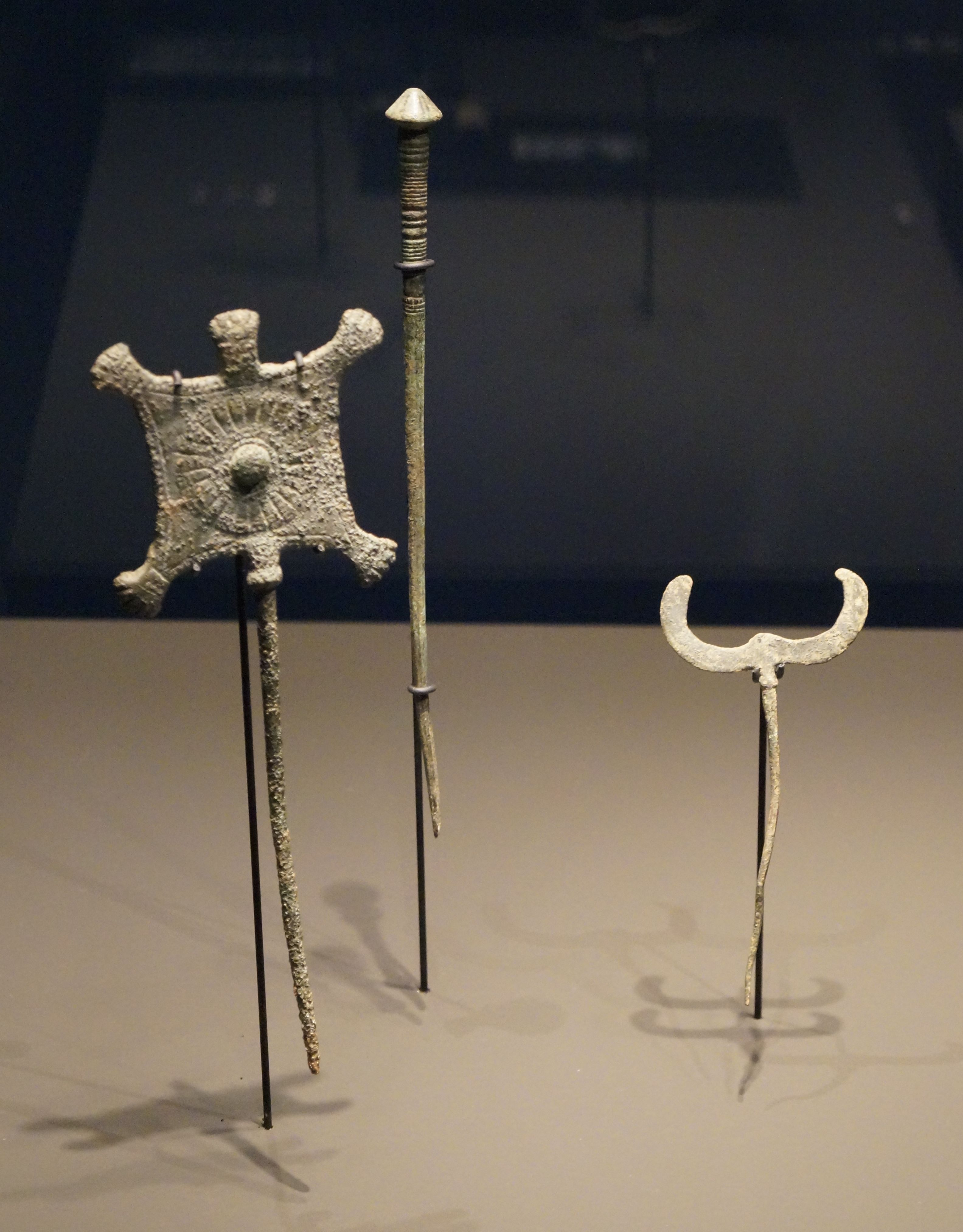 Die Ausstellung "Iran. Frühe Kulturen zwischen Wasser und Wüste" in der Bonner Kunst- und Ausstellungshalle der Bundesrepublik Deutschland zeigte vom 13. April bis 20. August 2017 Kunstgegenstände der iranischen Kulturen der Frühzeit, vom 7. bis ins 1. Jahrtausend v. Chr., und gab einen Einblick in auf eine in Europa wenig bekannte Bildwelt aus einem über Jahrzehnte verschlossenen Land.